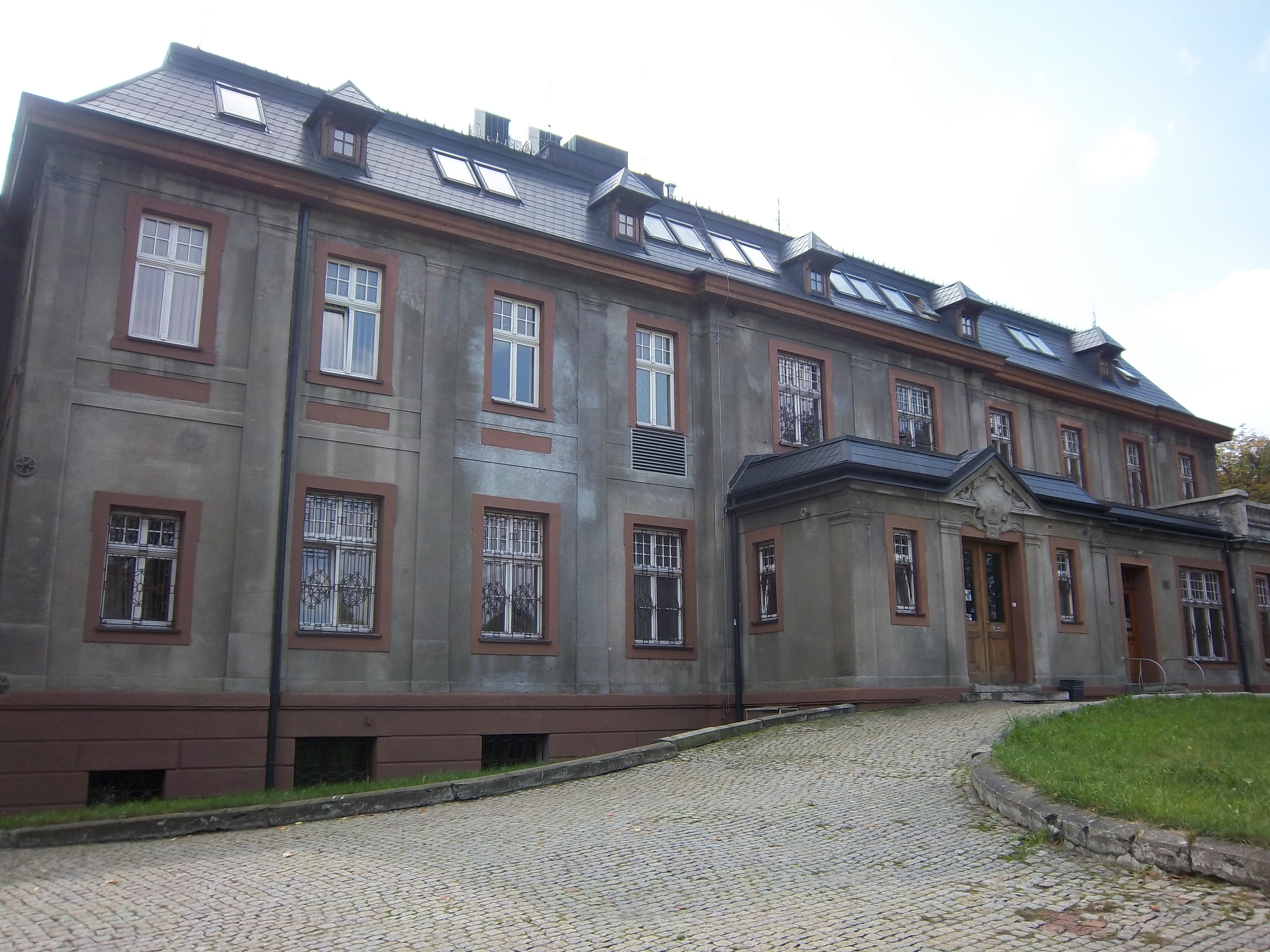 Budynek dworski dawnego folwarku z 1886 roku (tzw. Pałac w Załężu). Katowice, ul. Gliwicka 159, Katowice